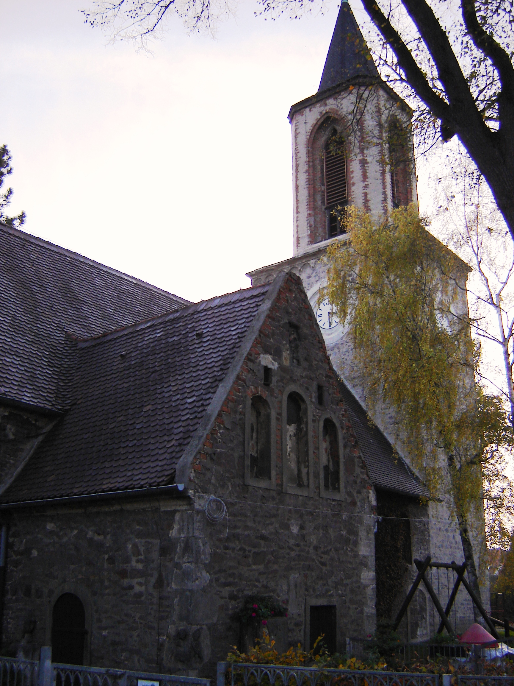 Evangelische Kirche in Magdeburg-Diesdorf.